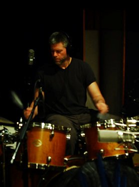 Барретт Мартин, барабанщик Screaming Trees